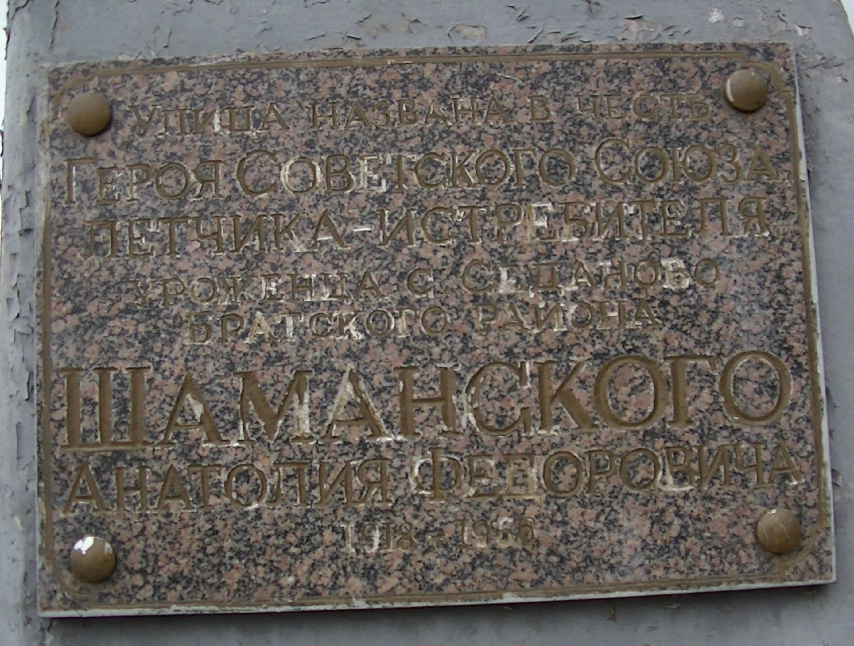 Мемориальная доска на памятнике Герою Советского Союза Анатолию Федоровичу Шаманскому